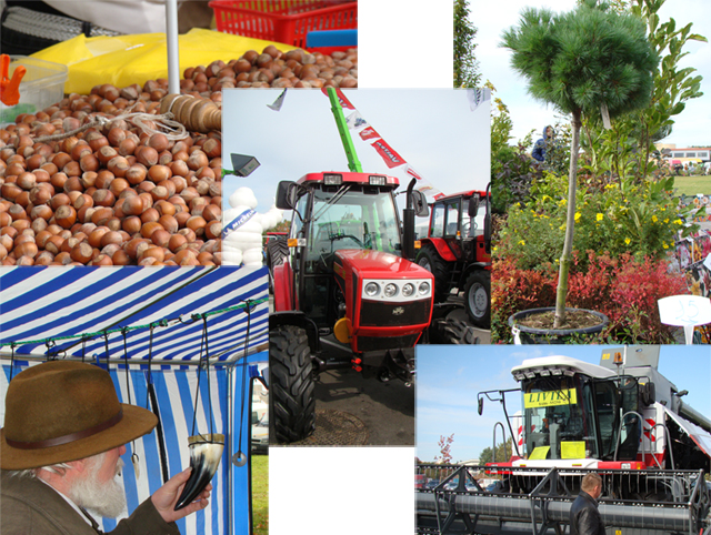 AgroBalt 2008 vaizdeliai